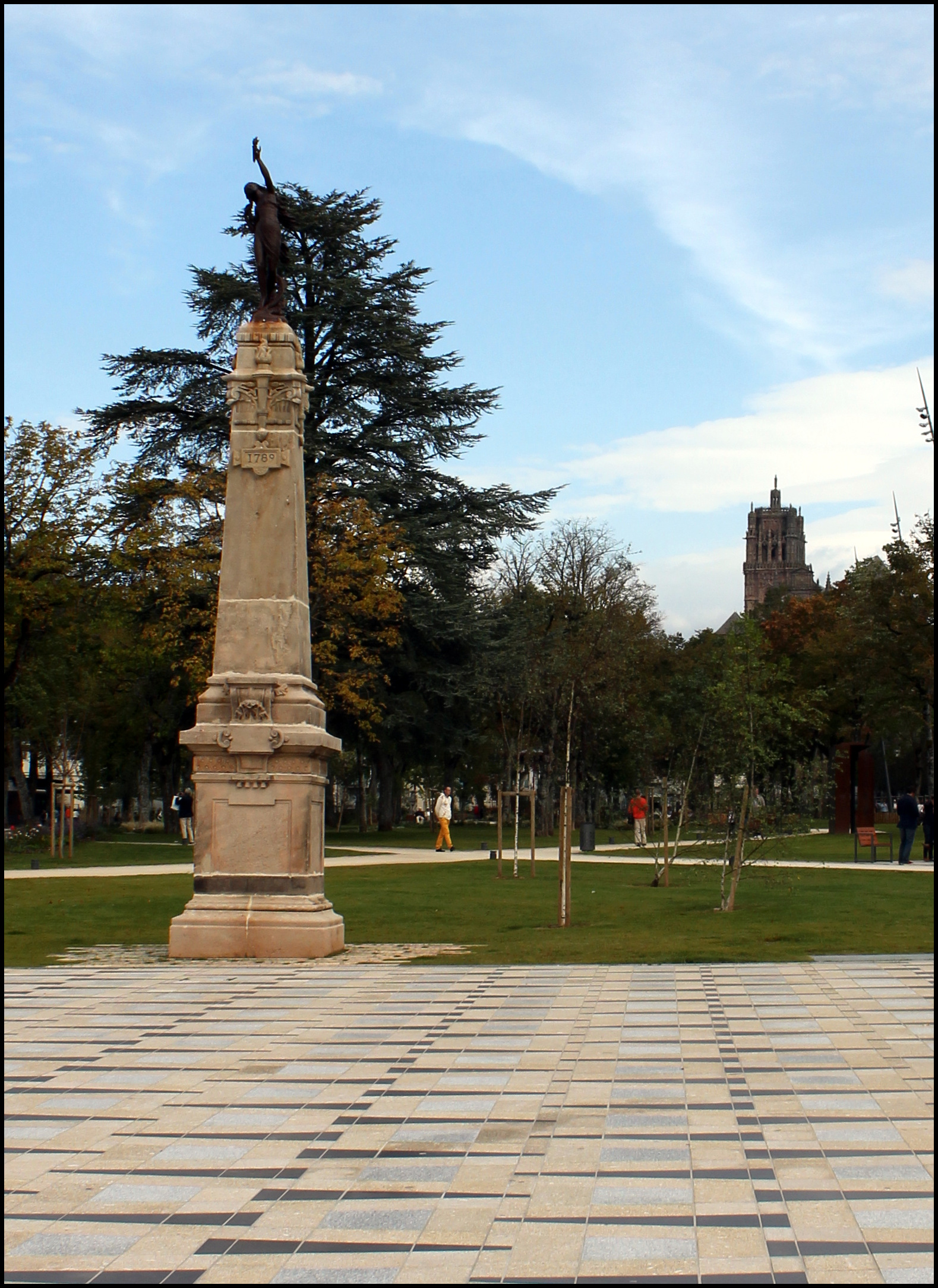 Jardin public du Foirail à Rodez